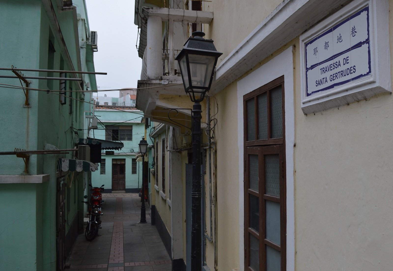 ポルトガル語はマカオの文化価値